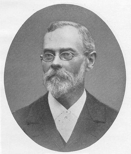 K. Pauli